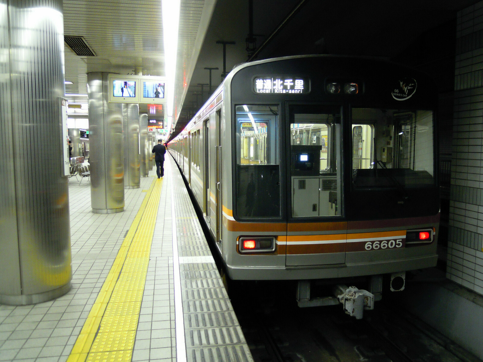 Sakaisuji-Line Tengachaya Station platform